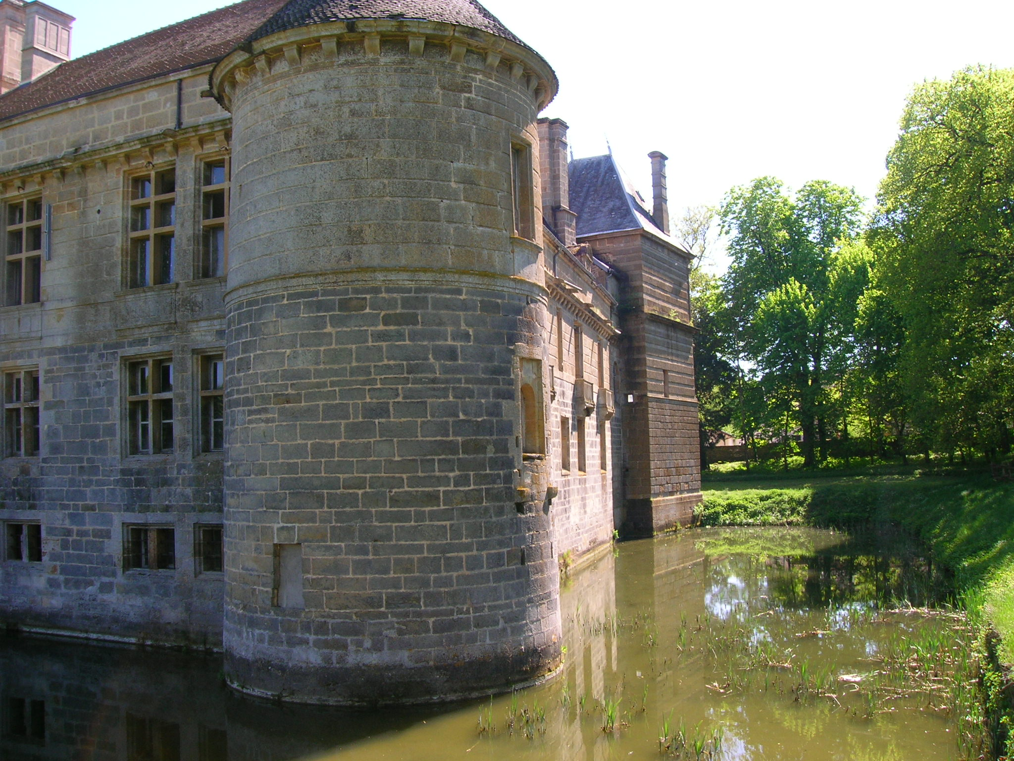 Les douves du château du Pailly